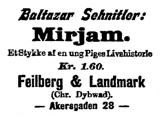 Avertissement for Balthazar Schnitlers "Mirjam". Her efter Norske Intelligenssedler 19.10.1896